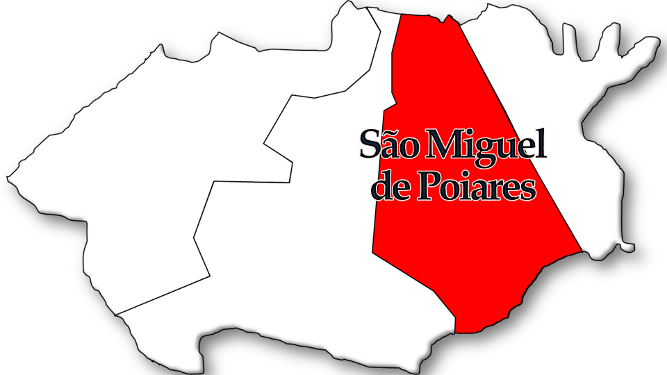 População